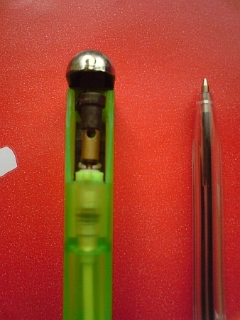 Wygląd dyszy wewnątrz zapalniczki żarowej.